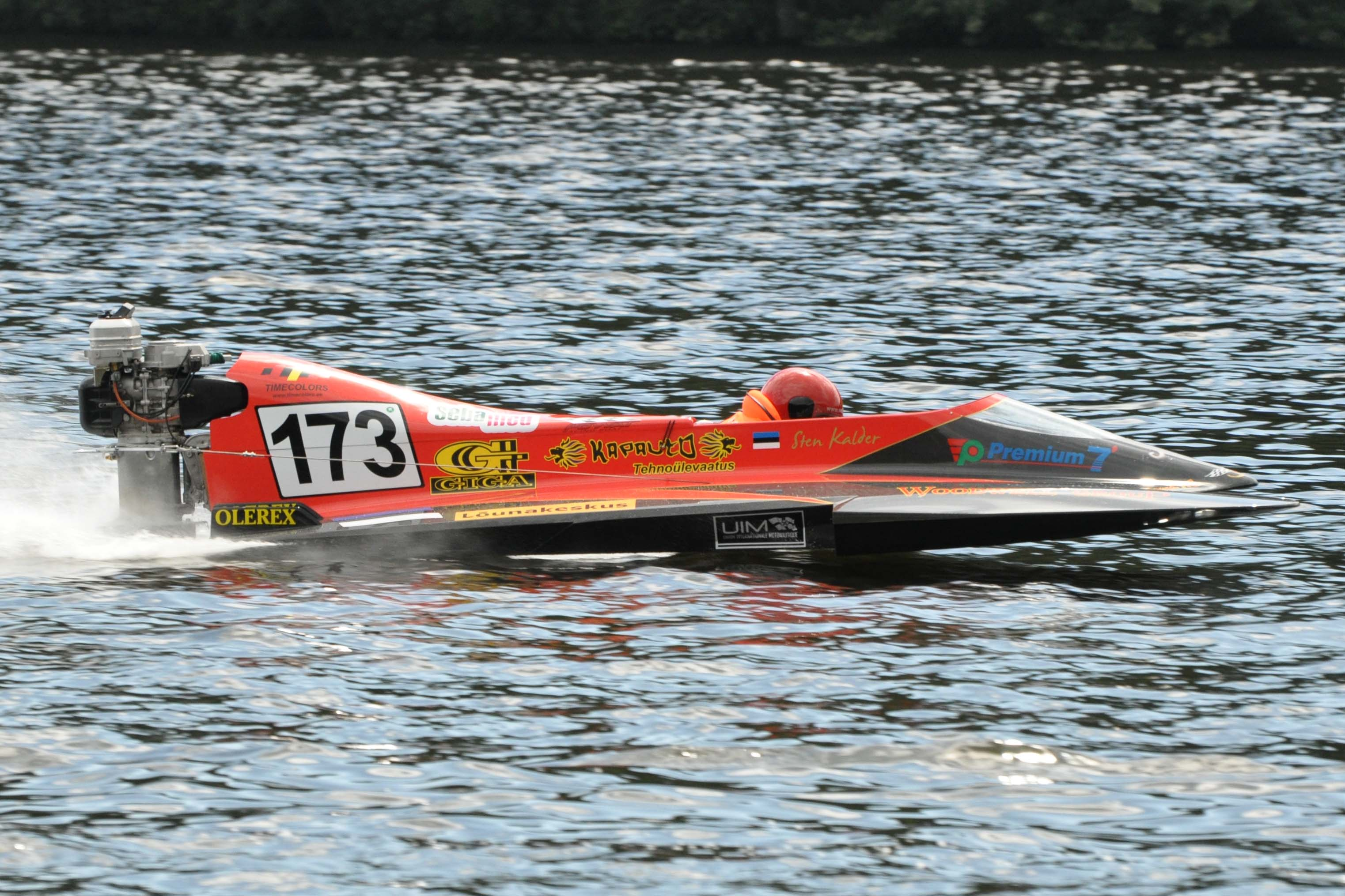 Sten Kalder kolmekordne veemoto maailmameister